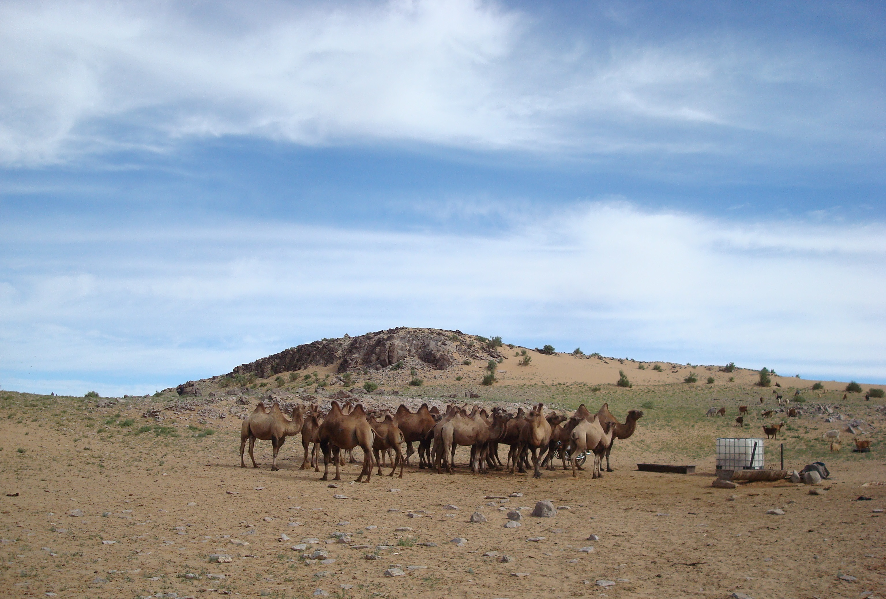 Im Ömnögovi Aimag